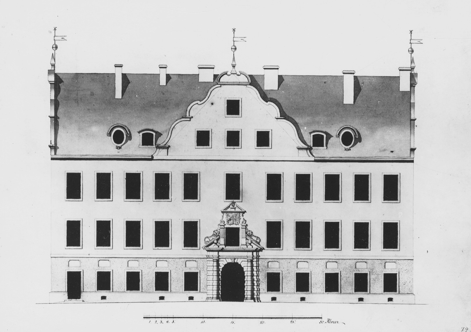 Torstensonska palatset. Fasad mot Fredsgatan. Lavering av Erik Palmstedt på 1780-talet.